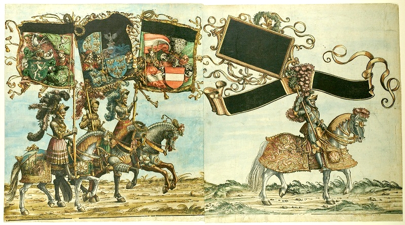 Das Bild ist ein Teil der Holzschnittserie "Triumphzug Kaiser Maximilians I."